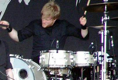 El baterista de My Chemical Romance, Bob Bryar, tocando en un concierto en Australia